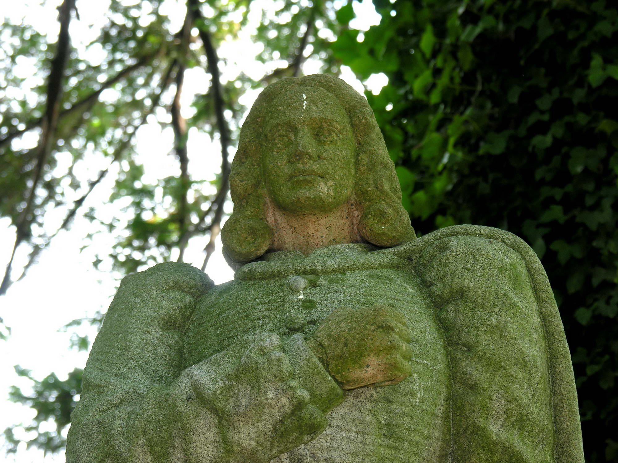 Estatua de Macias o namorado. Xardín botánico de Padrón, Galicia Publish by= Luis Miguel Bugallo Sánchez.